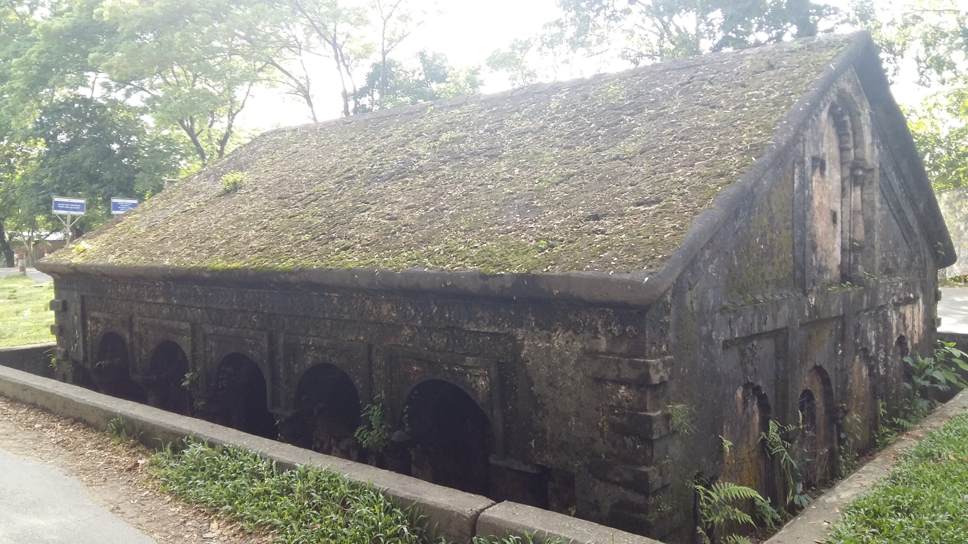 ইরাবতী পান্থশালা